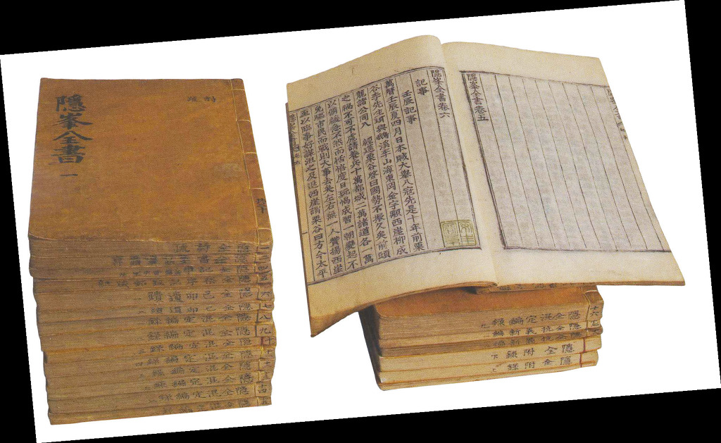 은봉 안방준의 문집(1864년 간행)